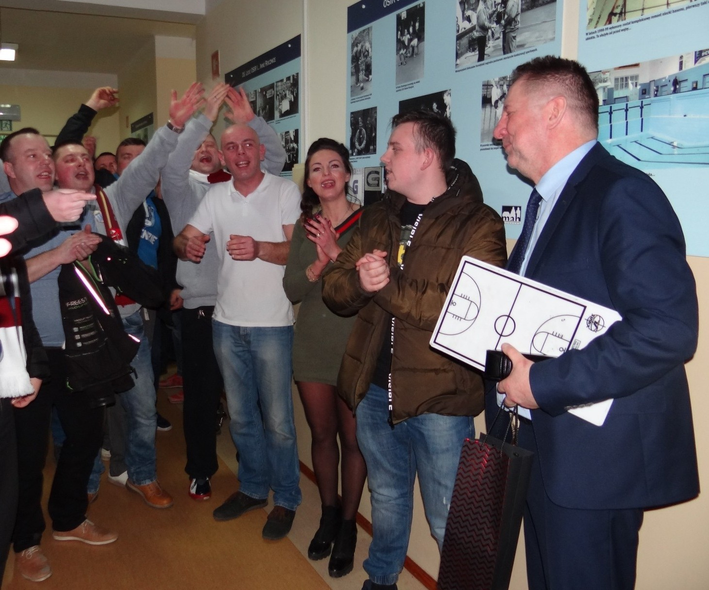 Jubileuszowe 100 lat od kibiców dla trenera Koziorowicza, 24.03.2018